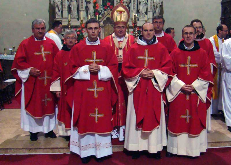 Svećeničko ređenje u sarajevskoj katedrali.Kardinal Vinko Puljić u sredini